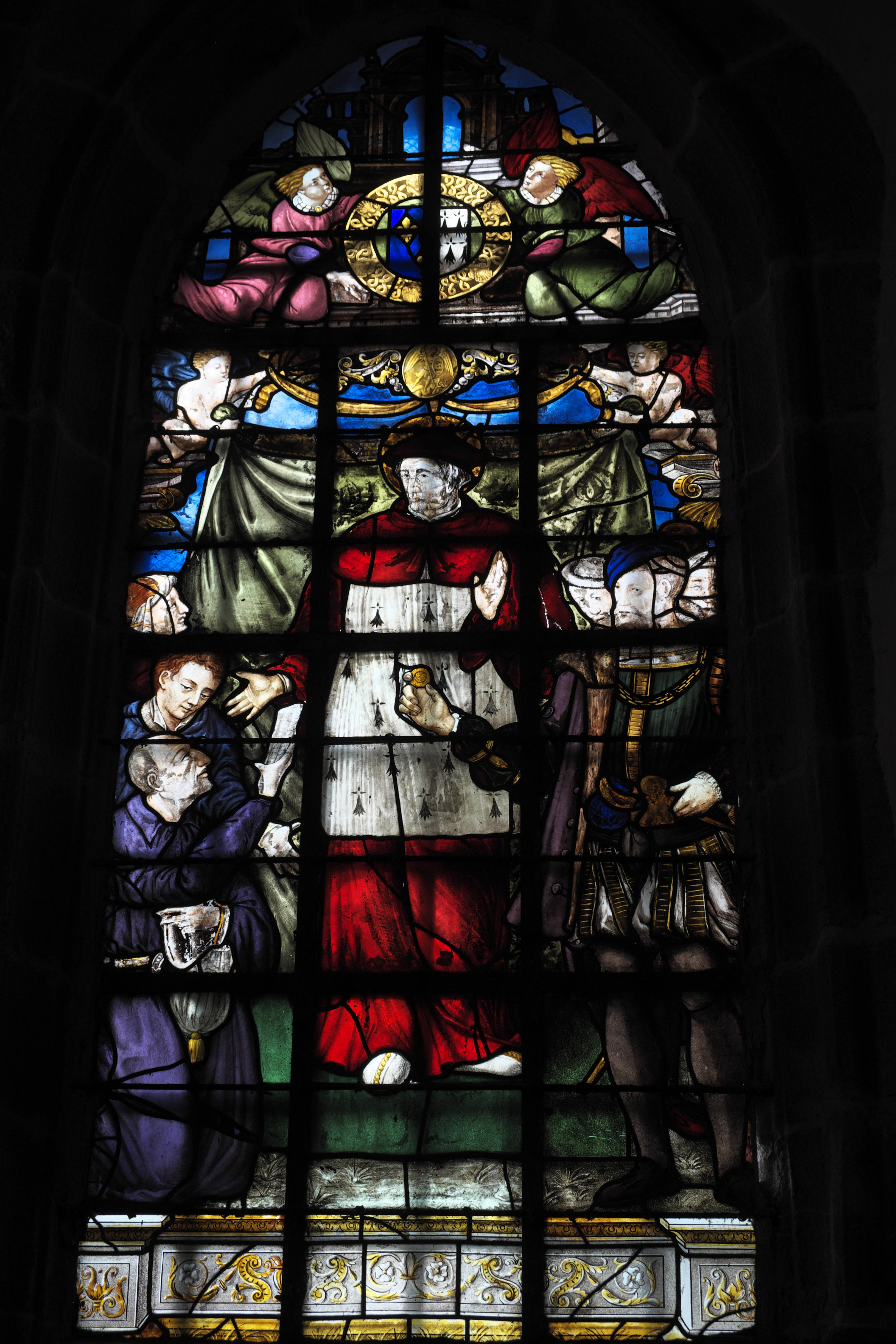 Katholische Pfarrkirche Saint-Ouen in Les Iffs im Département Ille-et-Vilaine (Region Bretagne/Frankreich), Bleiglasfenster (baie 6) um 1587; Darstellung: Ivo Hélory